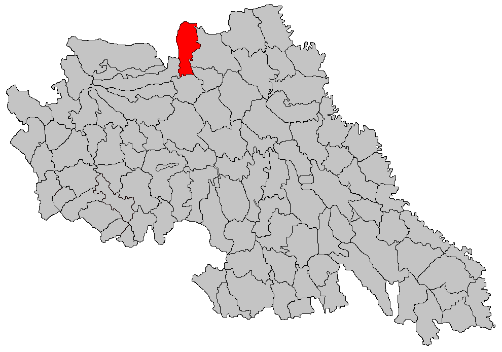 Categorie:Hărţi ale judeţului Iaşi